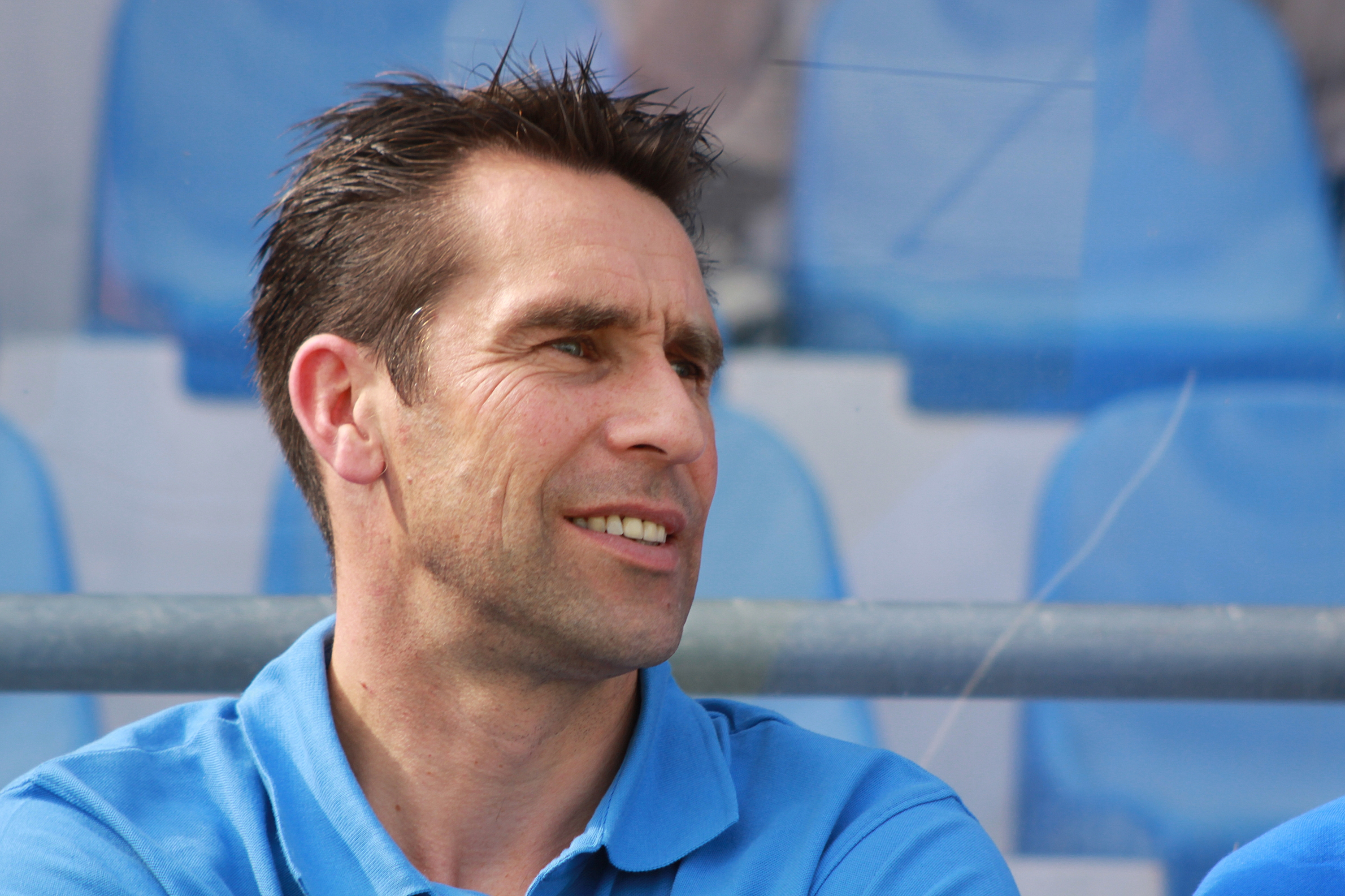 Michael Preetz - Hertha BSC Berlin (2)